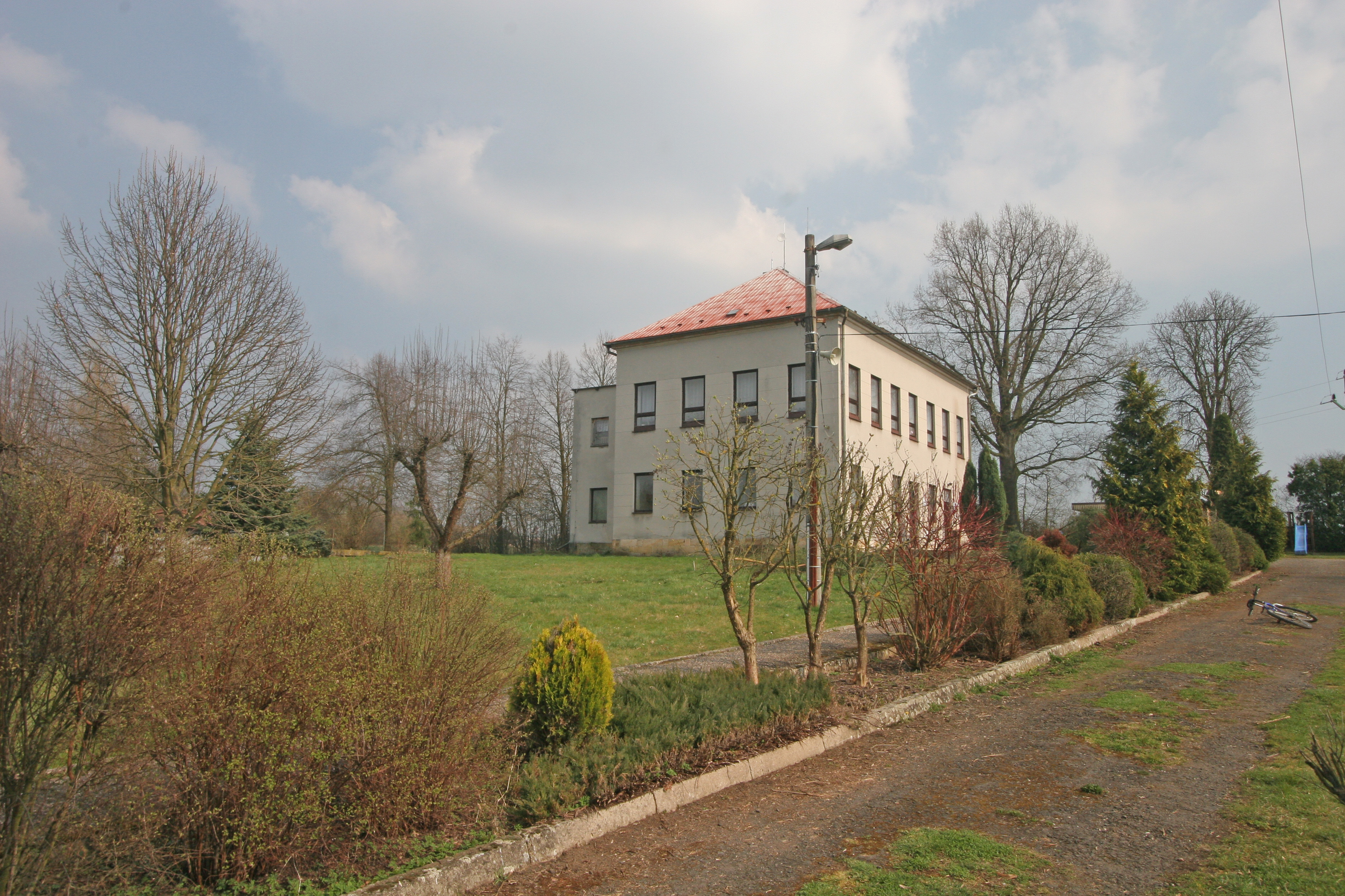 Kacákova Lhota bývalá škola